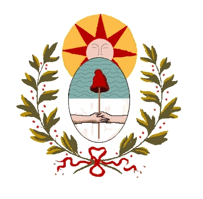 proto escudo argentino, salvoconducto de diputados de la asamblea francesa en 1793 trabajo propio basado en ilustración del siglo XIX pruxo 2007